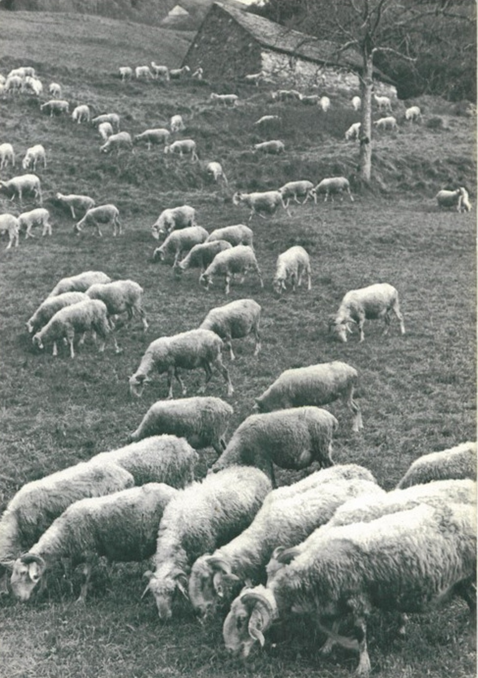 Troupeau à l'estive dans les Hautes-Alpes